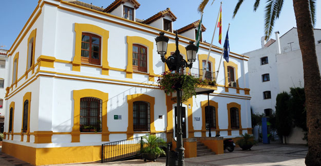 Vista exterior de la villa de San Luis.